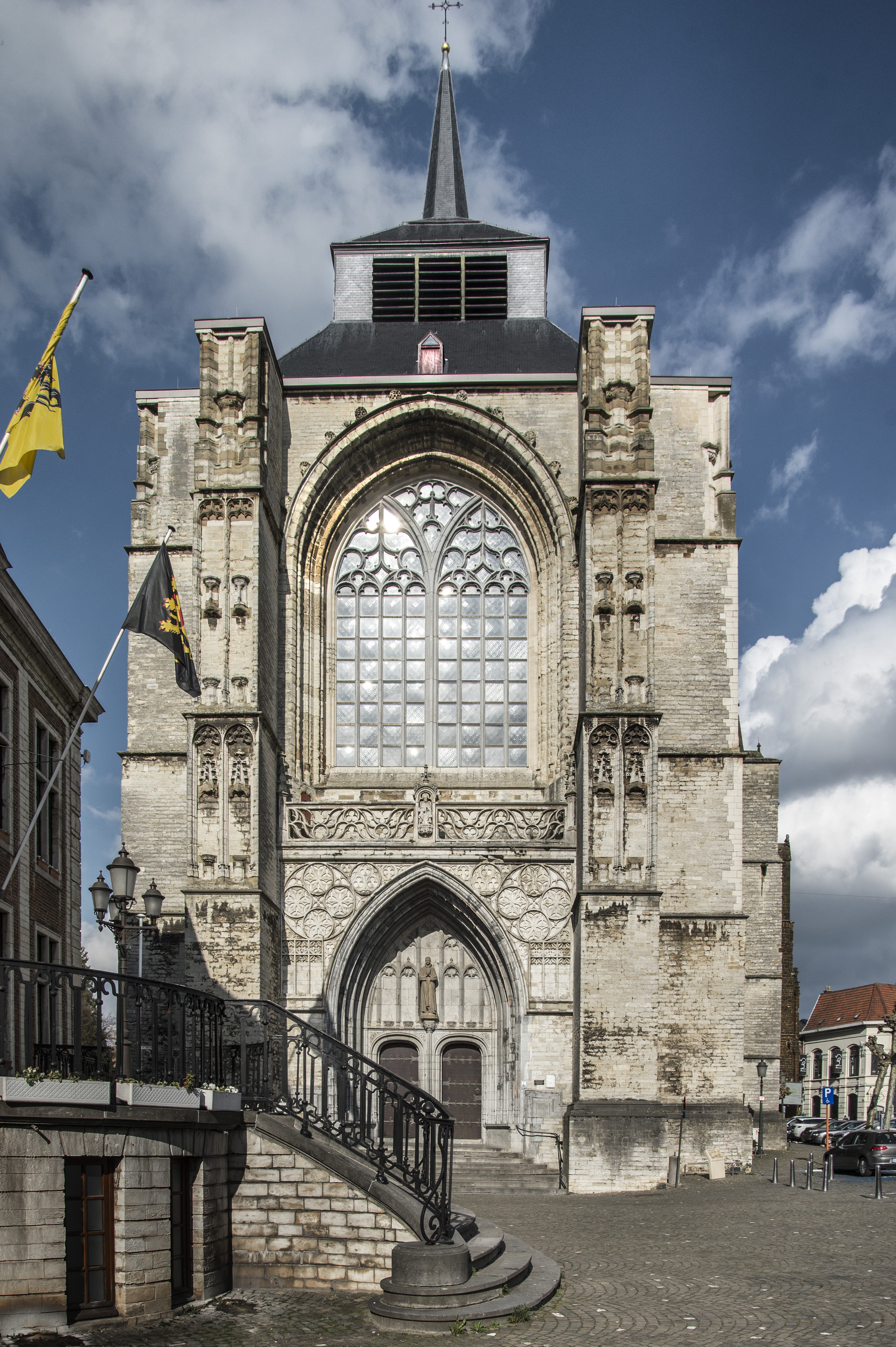 Sint-Sulpitiuskerk op de Grote Markt van Diest